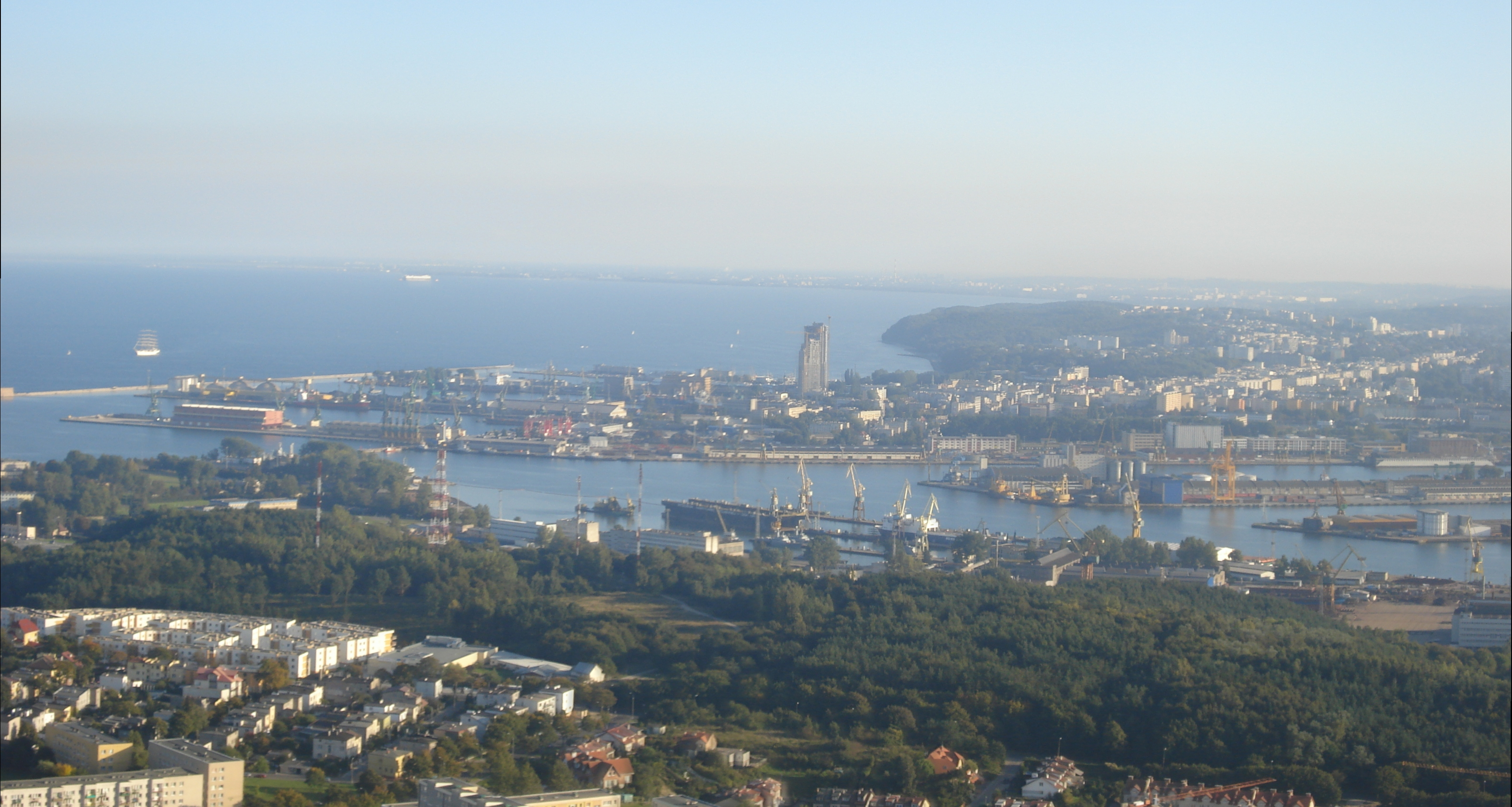 Gdynia z "lotu ptaka"